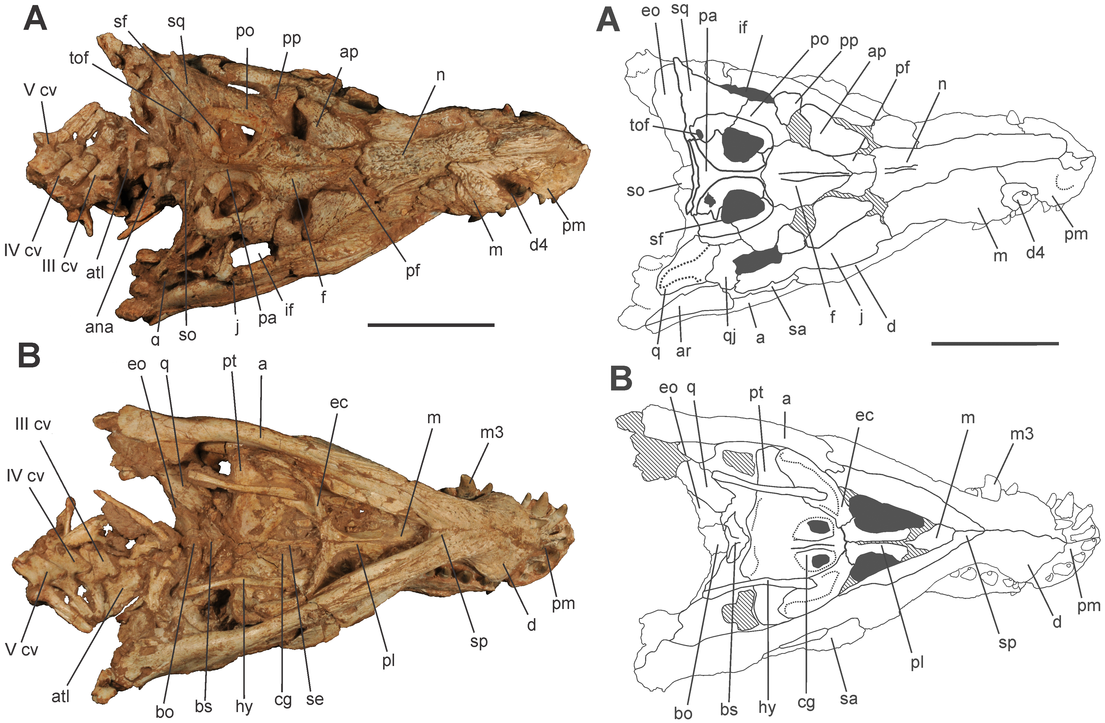 Left: Skull of Aplestosuchus sordidus LPRP/USP 0229a in A, dorsal view; and B, ventral. Abbreviations: a, angular; ap, anterior palpebral; ana, atlantal neural arch; atl, atlas; bo, basioccipital; bs, basisphenoid; cg, choanal groove; d, dentary; d4, dentary tooth 4; ec, ectopterygoid; eo, exoccipital; f, frontal; hy, hyoid aparatus; if, infratemporal fenestra; j, jugal; m, maxilla; m3, maxillary tooth 3; n, nasal; pa, parietal; pf, prefrontal; pl, palatine; pm, premaxilla; po, postorbital; pp, posterior palpebral; pt, pterygoid; q, quadrate; se, choanal septum; sf, supratemporal fenestra; so, supraoccipital; sq, squamosal; sp, splenial; tof, temporo-orbital foramen; III–V cv, cervical vertebrae III–V. Scale bar equals 10 cm. Right: Drawing of the skull of Aplestosuchus sordidus LPRP/USP 0229a in A, dorsal view; and B, ventral. Abbreviations: a, angular; ap, anterior palpebral; ar, articular; bo, basioccipital; bs, basisphenoid; cg, choanal groove; d, dentary; d4, dentary tooth 4; ec, ectopterygoid; eo, exoccipital; f, frontal; hy, hyoid aparatus; if, infratemporal fenestra; j, jugal; m, maxilla; m3, maxillary tooth 3; n, nasal; pa, parietal; pf, prefrontal; pl, palatine; pm, premaxilla; po, postorbital; pp, posterior palpebral; pt, pterygoid; q, quadrate; qj, quadratojugal; sa, surangular; sf, supratemporal fenestra; so, supraoccipital; sq, squamosal; sp, splenial; tof, temporo-orbital foramen. Scale bar equals 10 cm.